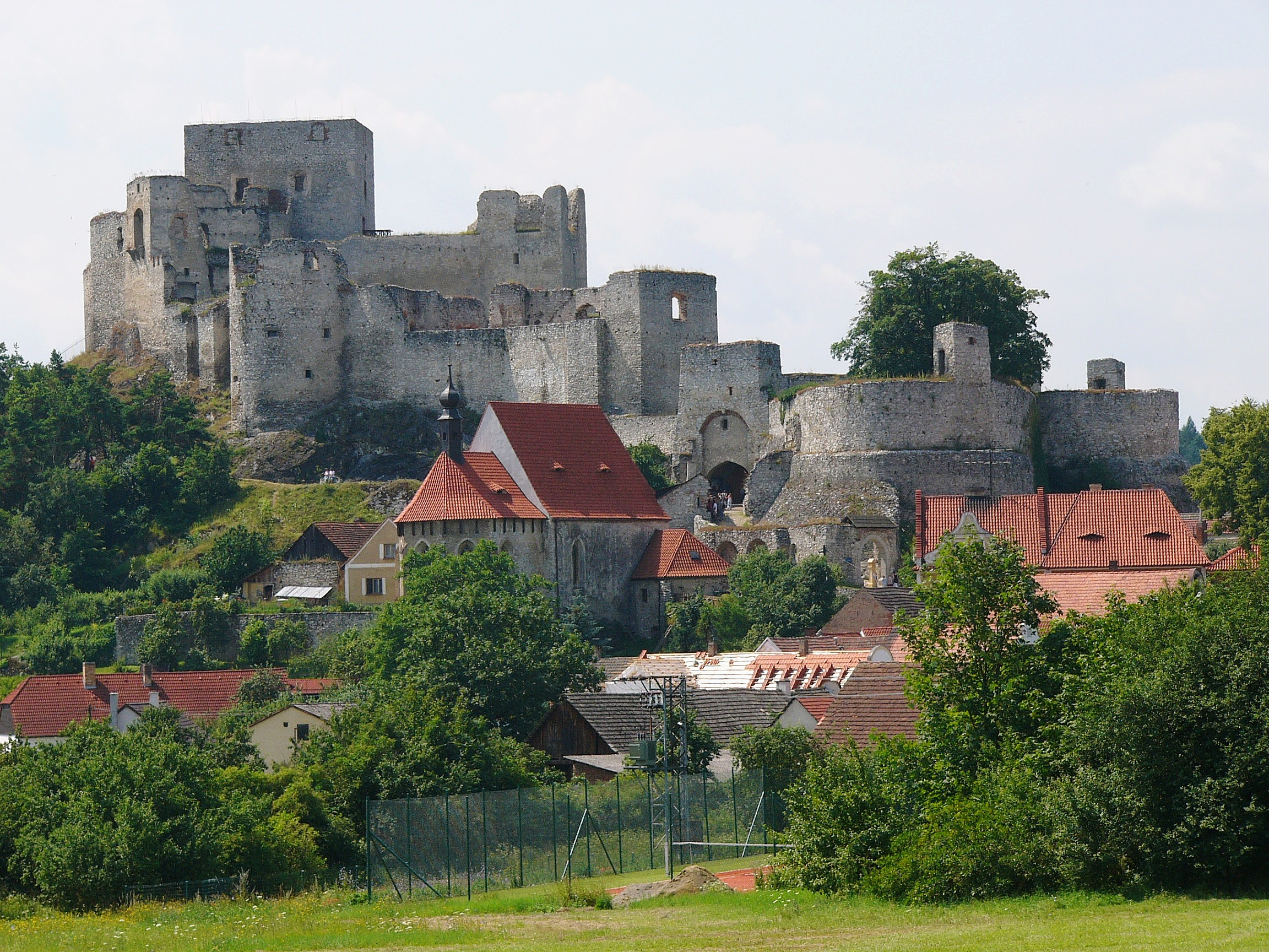 Pohled na hrad Rabí od severovýchodu